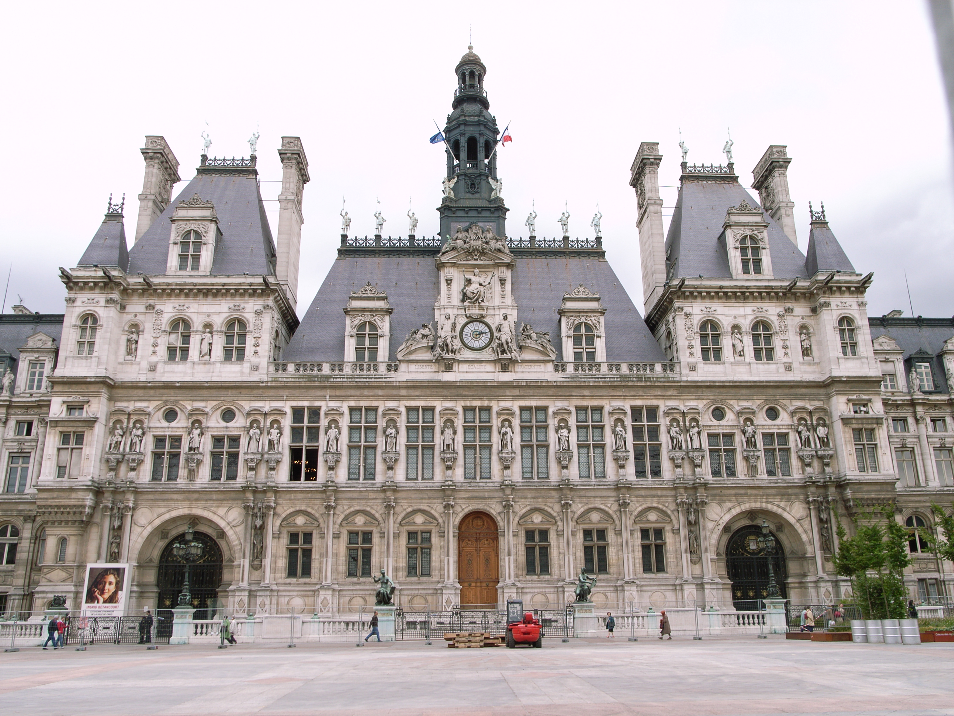 Отель-де-Виль, Париж